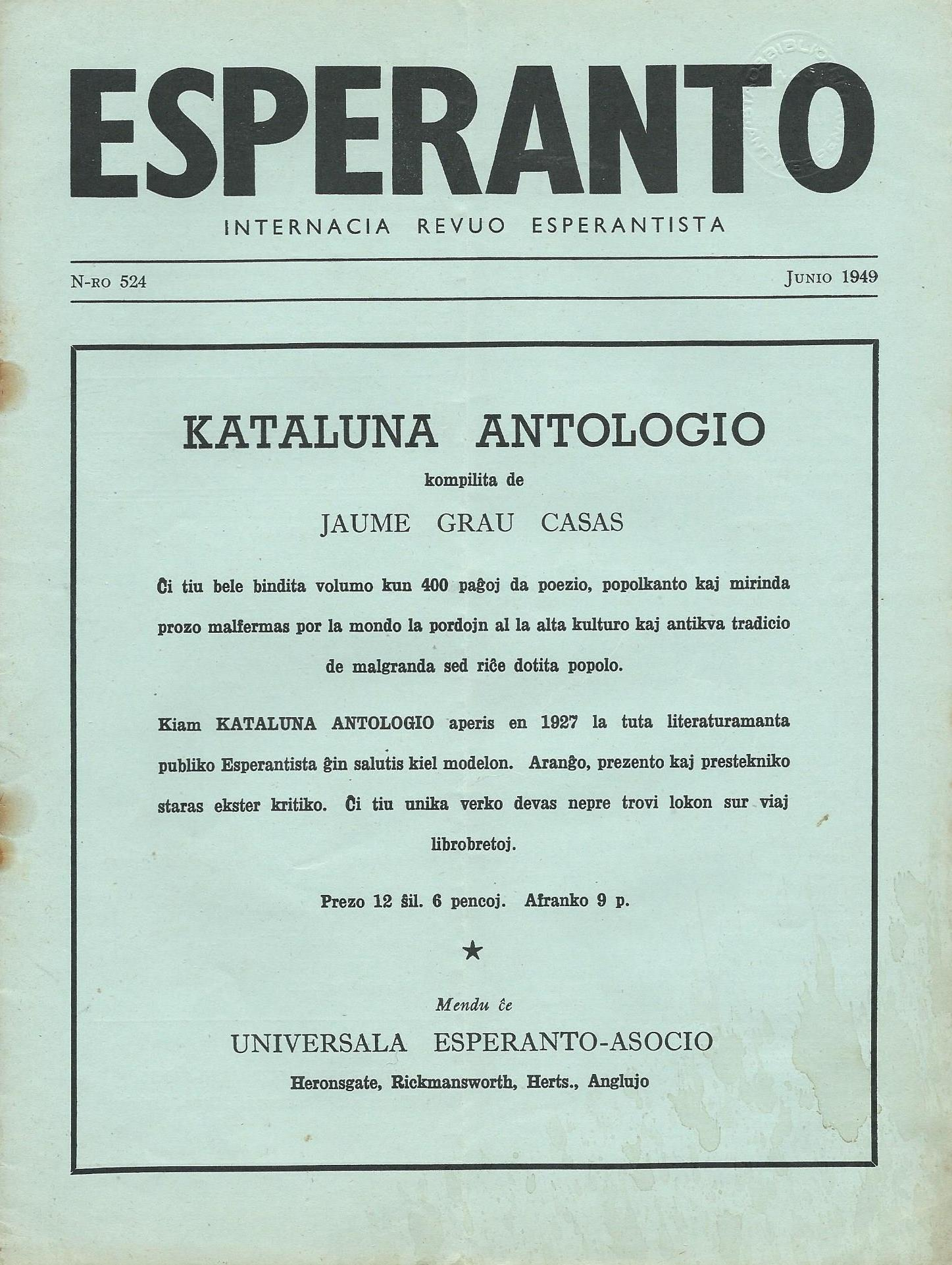 kovrilo de "Esperanto", 1949 junio